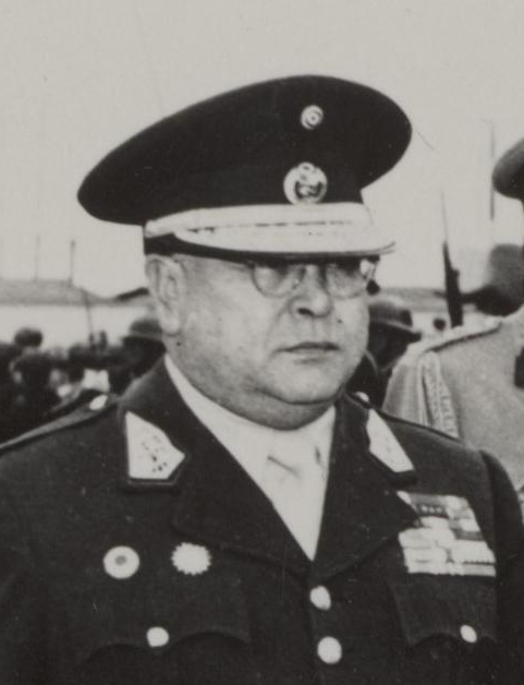 Zenón Noriega Agüero (1900-1957) militar peruano. Jefe de la Junta Militar (1950). Primer ministro y ministro de Guerra del Ochenio de Odría, de 1950 a 1954.